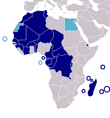 África francófona